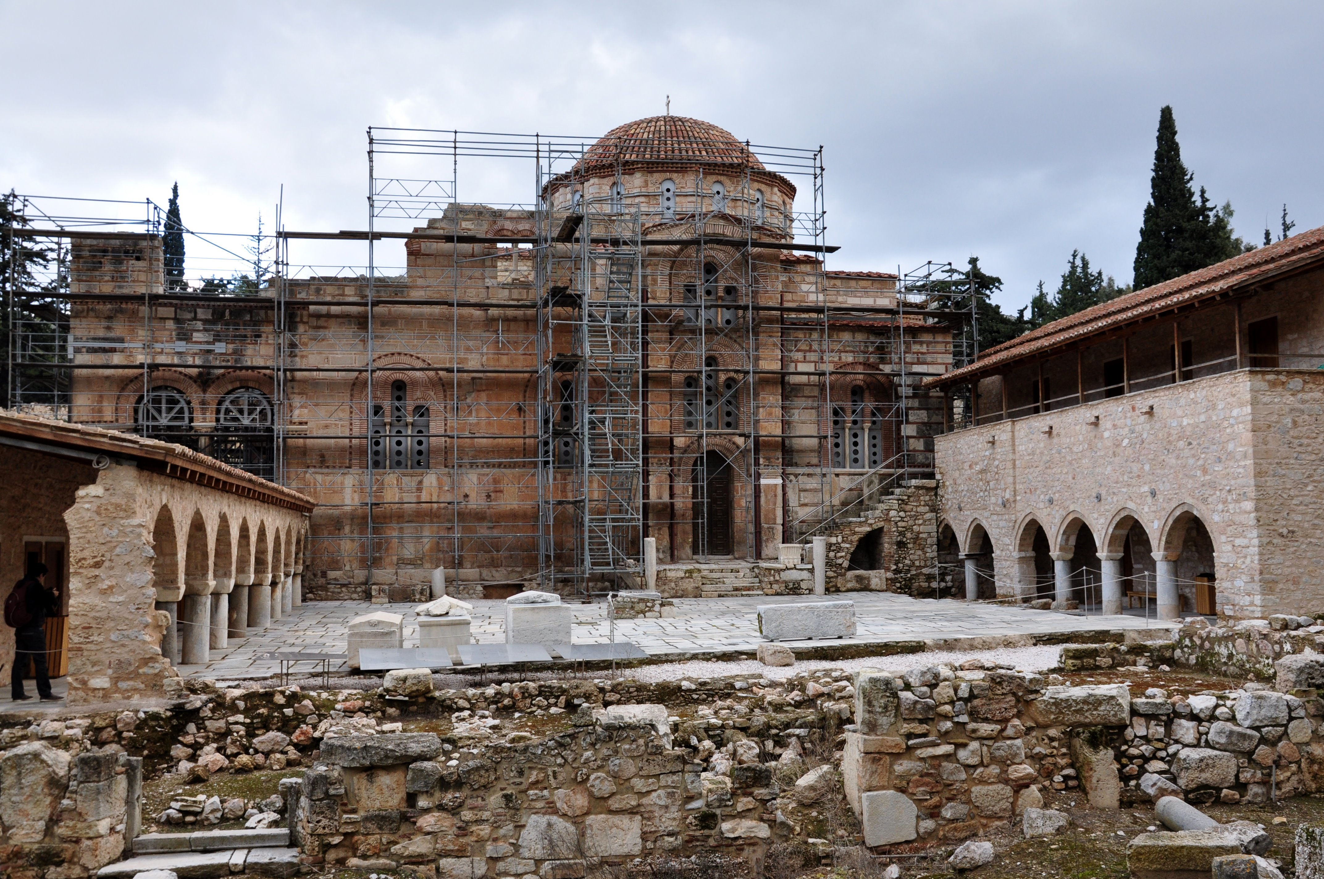 Dafni, obrzeża Aten. Widok bryły światyni od strony klasztornego dziedzińca. Jej wnętrze jest teraz ciemne i aż po chełm kopuły, szczelnie zastawione rusztowaniami. Jednak zapamiętałem, że w dawnych latach właśnie ta świątynia pełna była ciepła i słońca. Z samego monastyru, do dziś zachowało się tylko kilka izb. Mieszczą się w nich ekspozycja i sala projekcyjna.